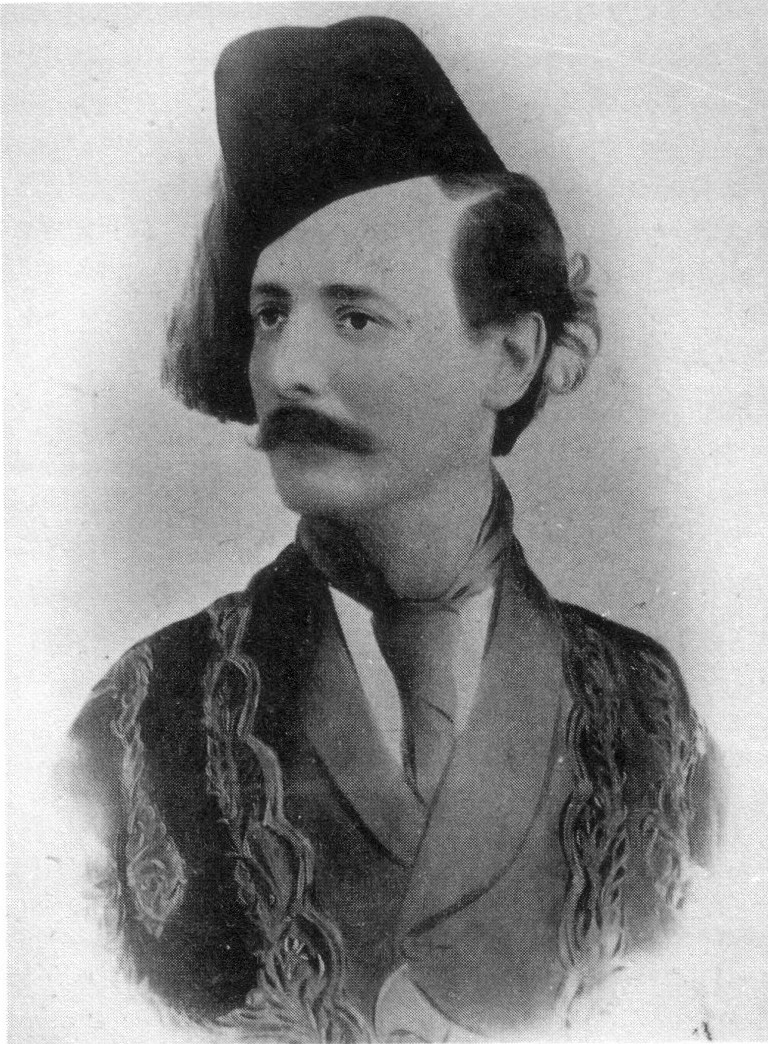 Early photo from Robert Hay in turkish costume (ca. 1855)